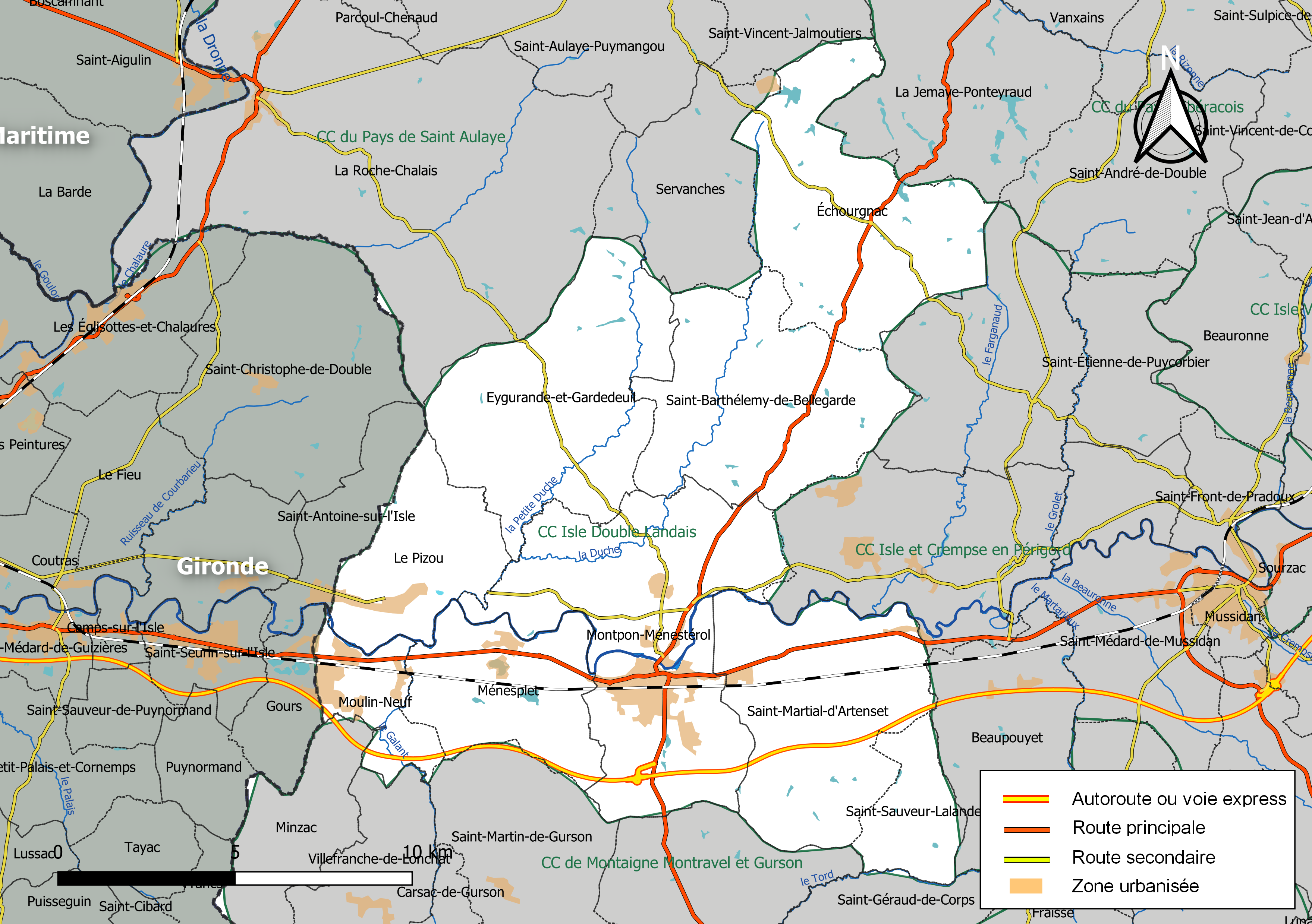 Carte géographique de la Communauté de communes Isle Double Landais , département de la Dordogne, France. Composition au 1er janvier 2019.